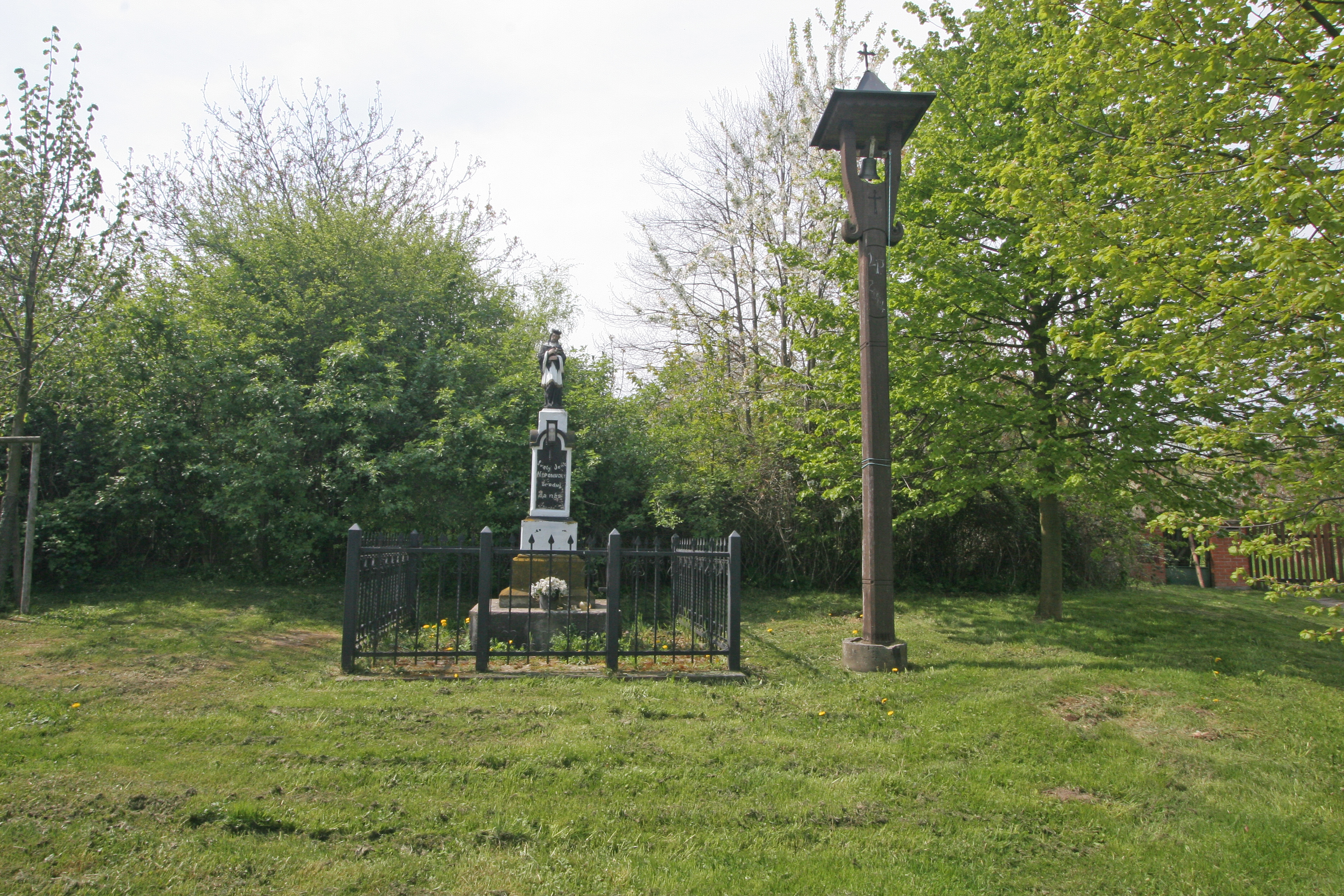 Radlín zvonice